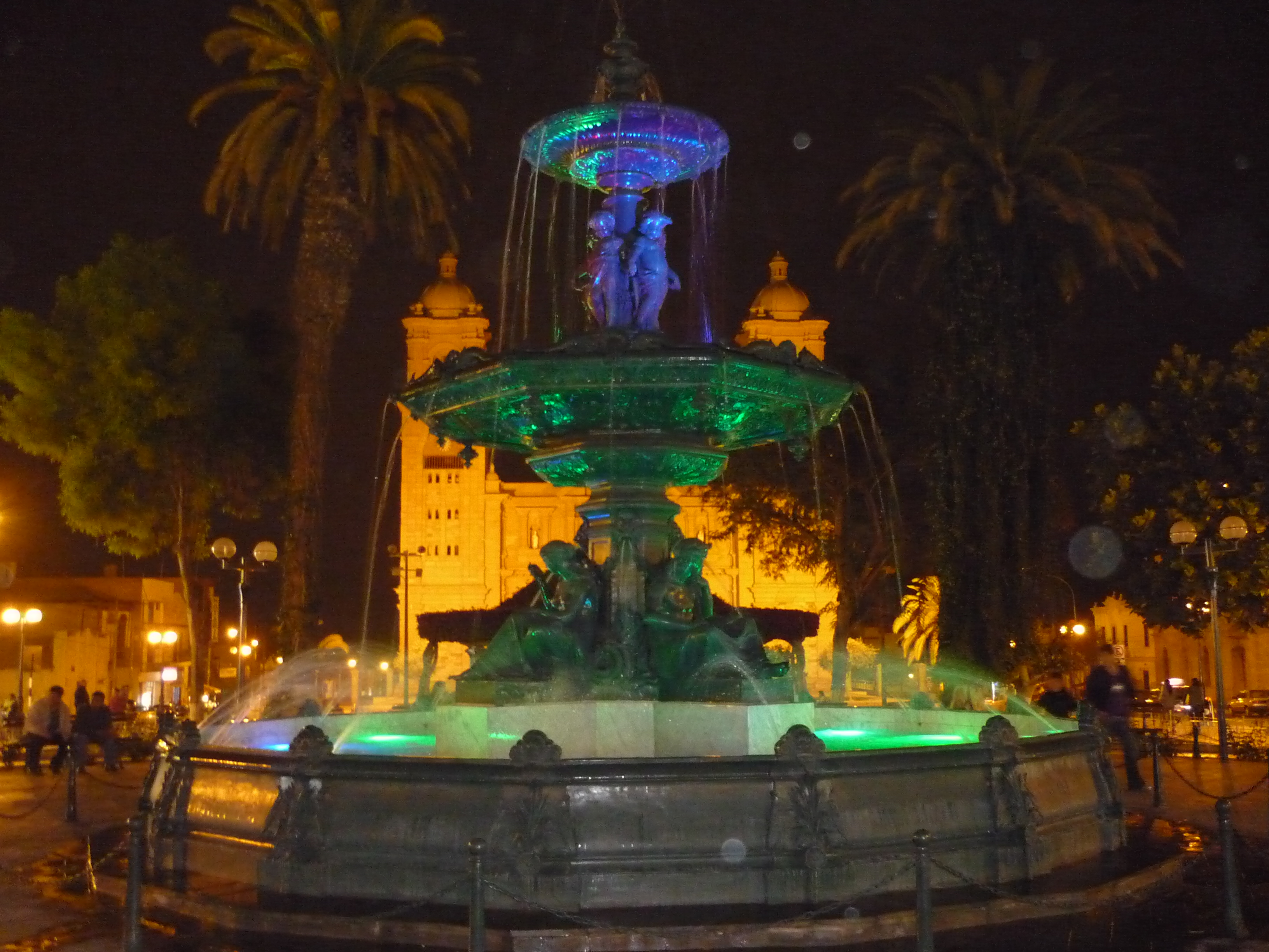 Vista nocturna de la Pila Ornamental de Tacna